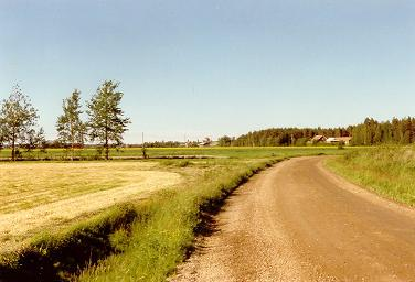 Lappfjärds slätt, en av Österbottens många